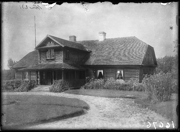 Беларуская (тарашкевіца): Міжрэчча (Mižrečča), сядзіба Мірскіх (Mirski)